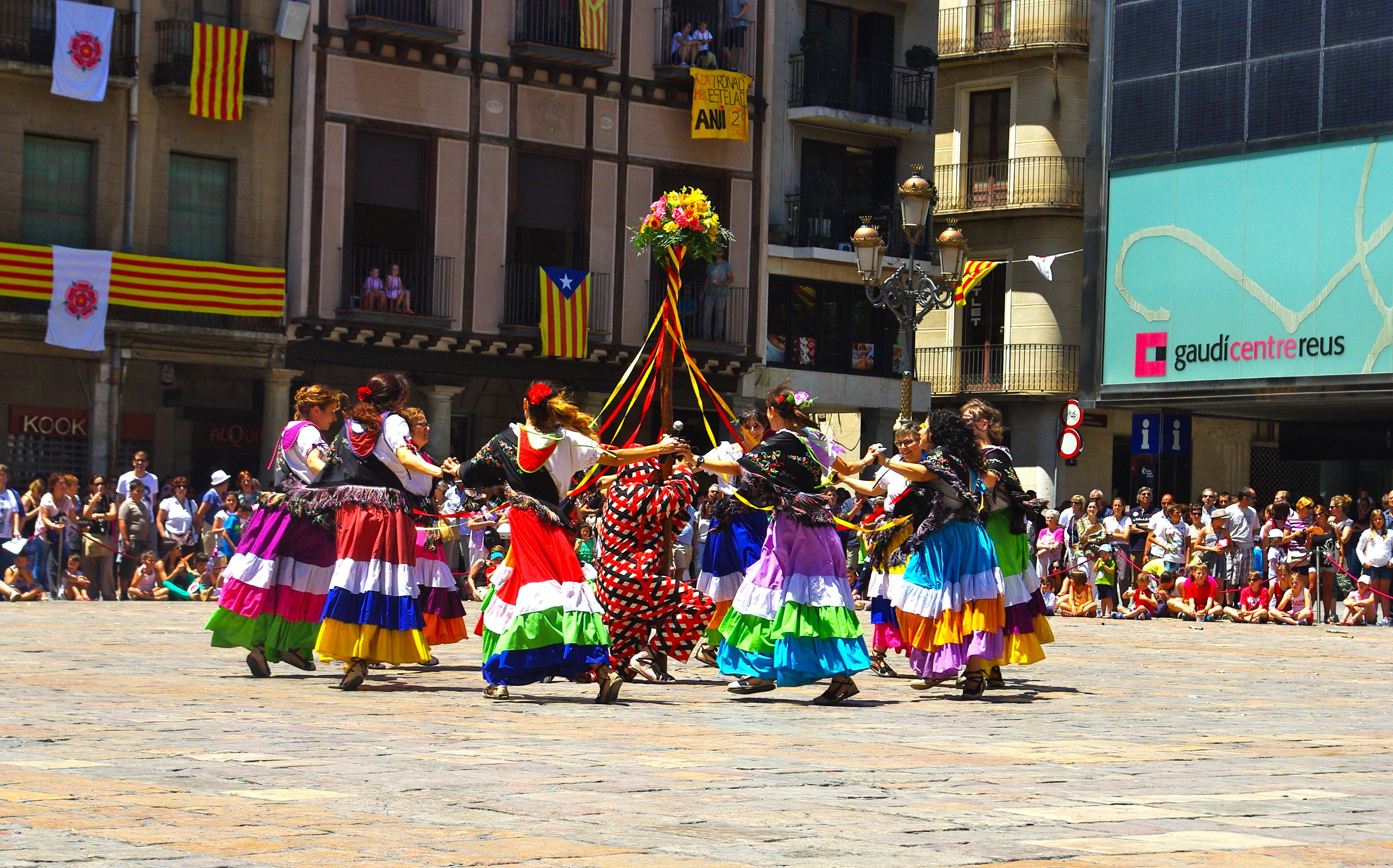 Ball de Gitanes. Festa Major de Reus de 2014